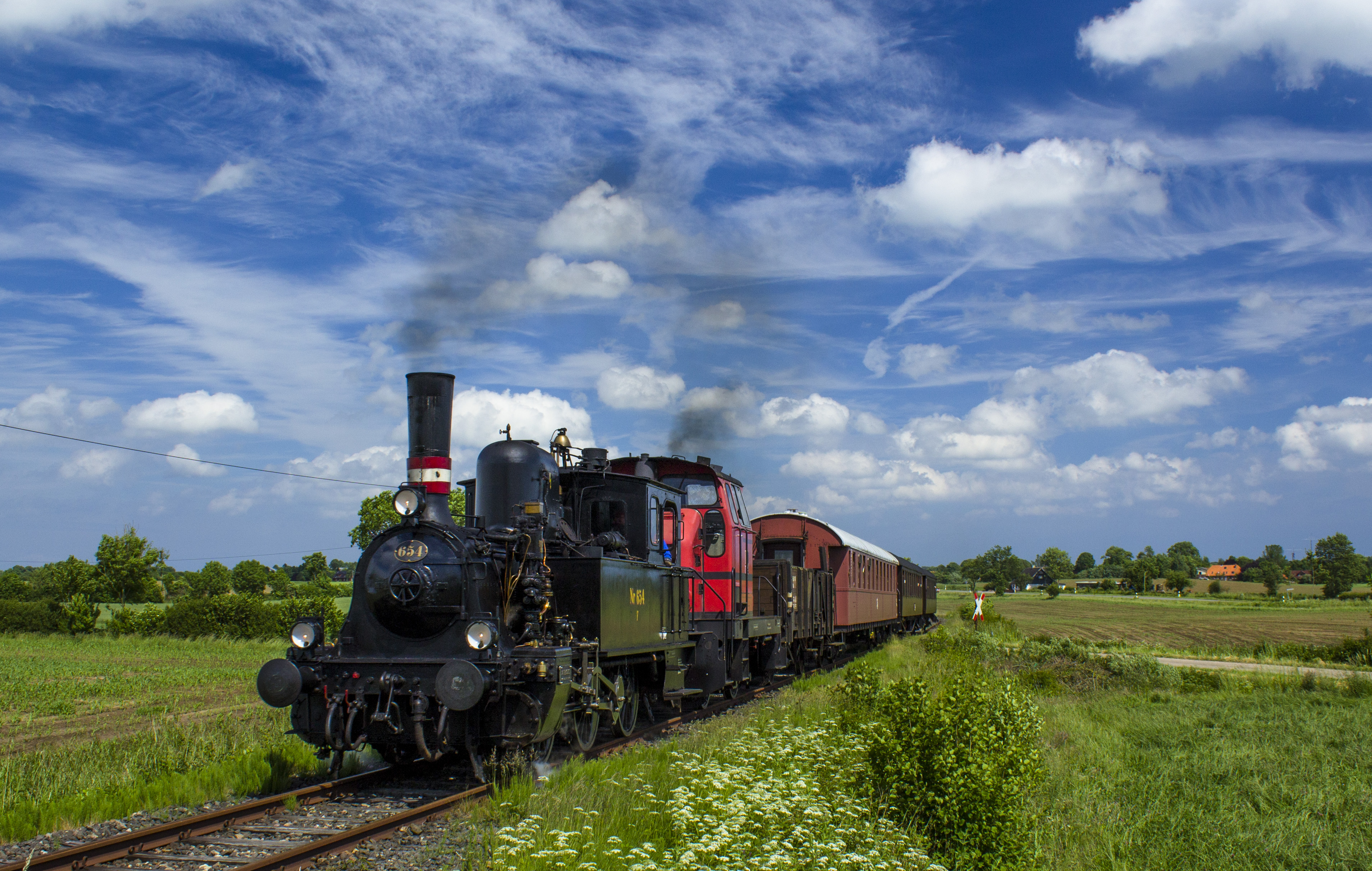 Der Zug der Angelner Dampfeisenbahn im Jahr 2017, mit "Julchen" (F 654) und "Zuckersusi" (Henschel DH 240 B)